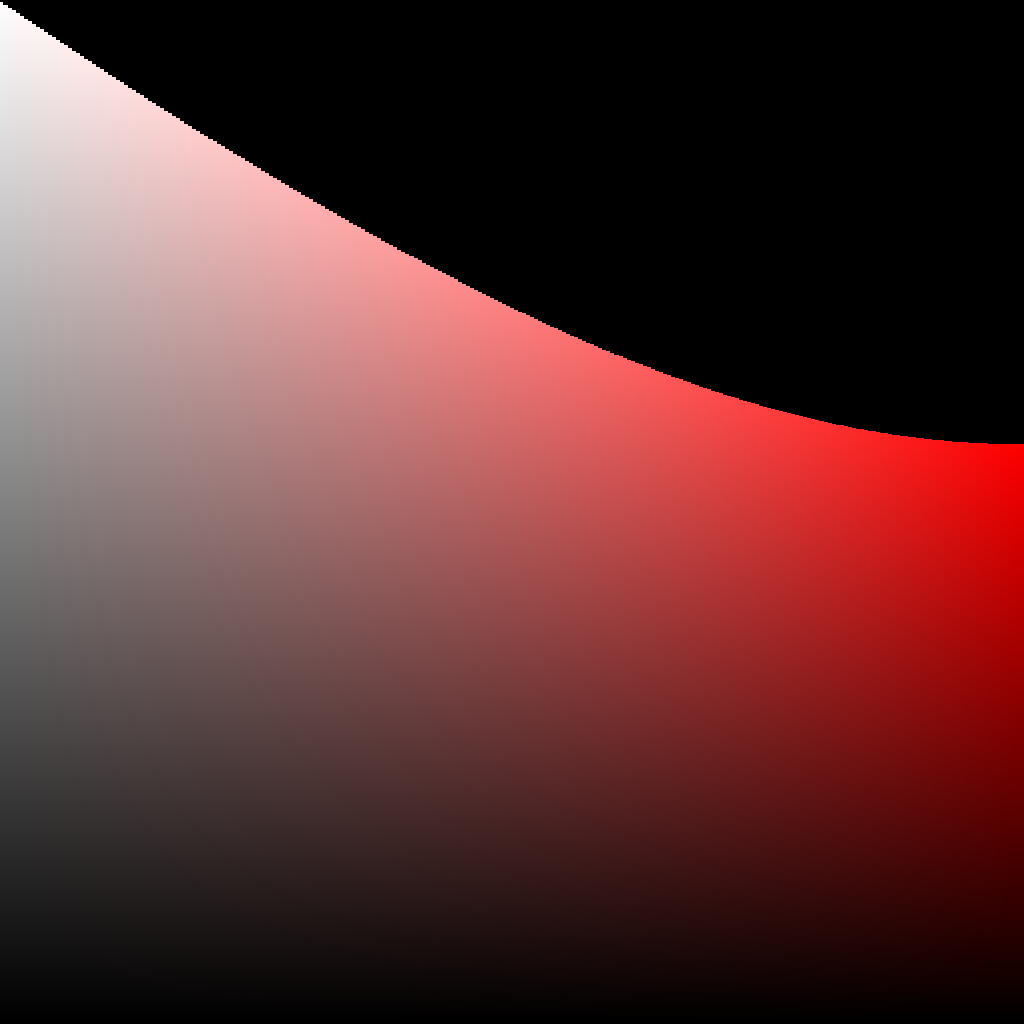 Doorsnede uit een kleurenruimte voor RGB-monitors. Op de assen: intensiteit (vertikaal) en verzadiging (horizontaal).